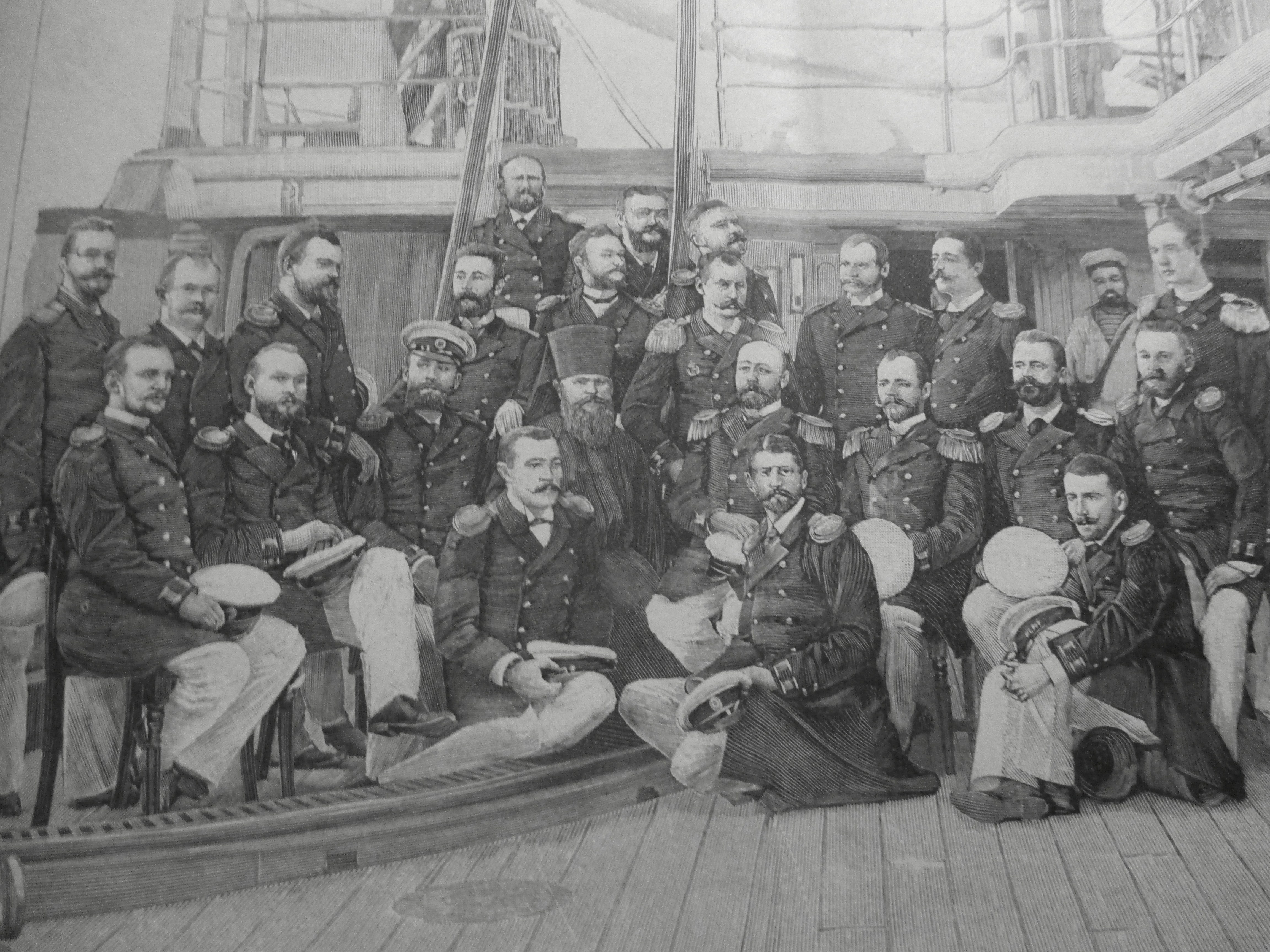 L'état-major de la Rynda de la flotte impériale russe en visite à Toulon, in L'Illustration, n° 2642, 14 octobre 1893.